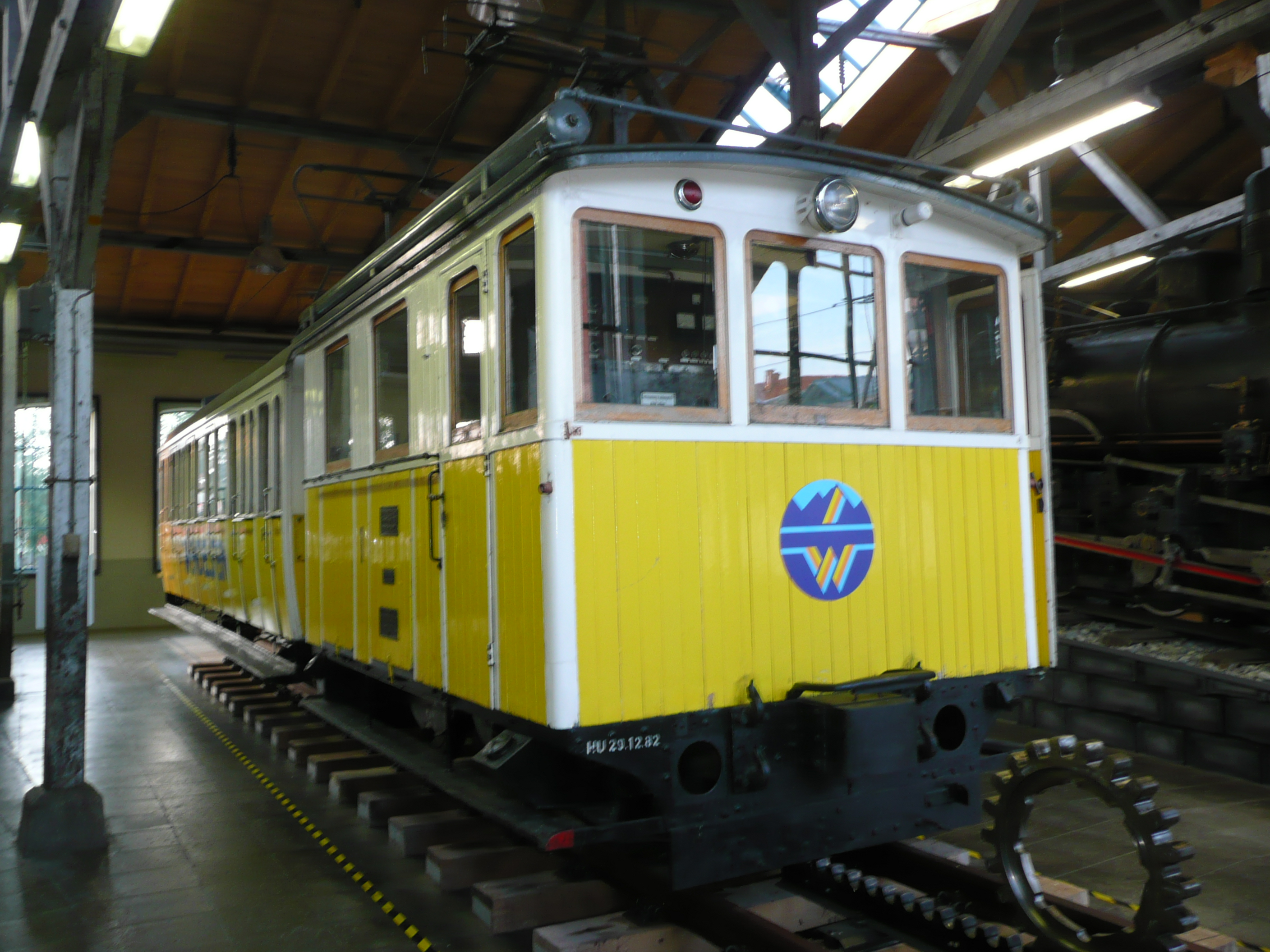 Triebwagen 1 mit Beiwagen der Wendelsteinbahn